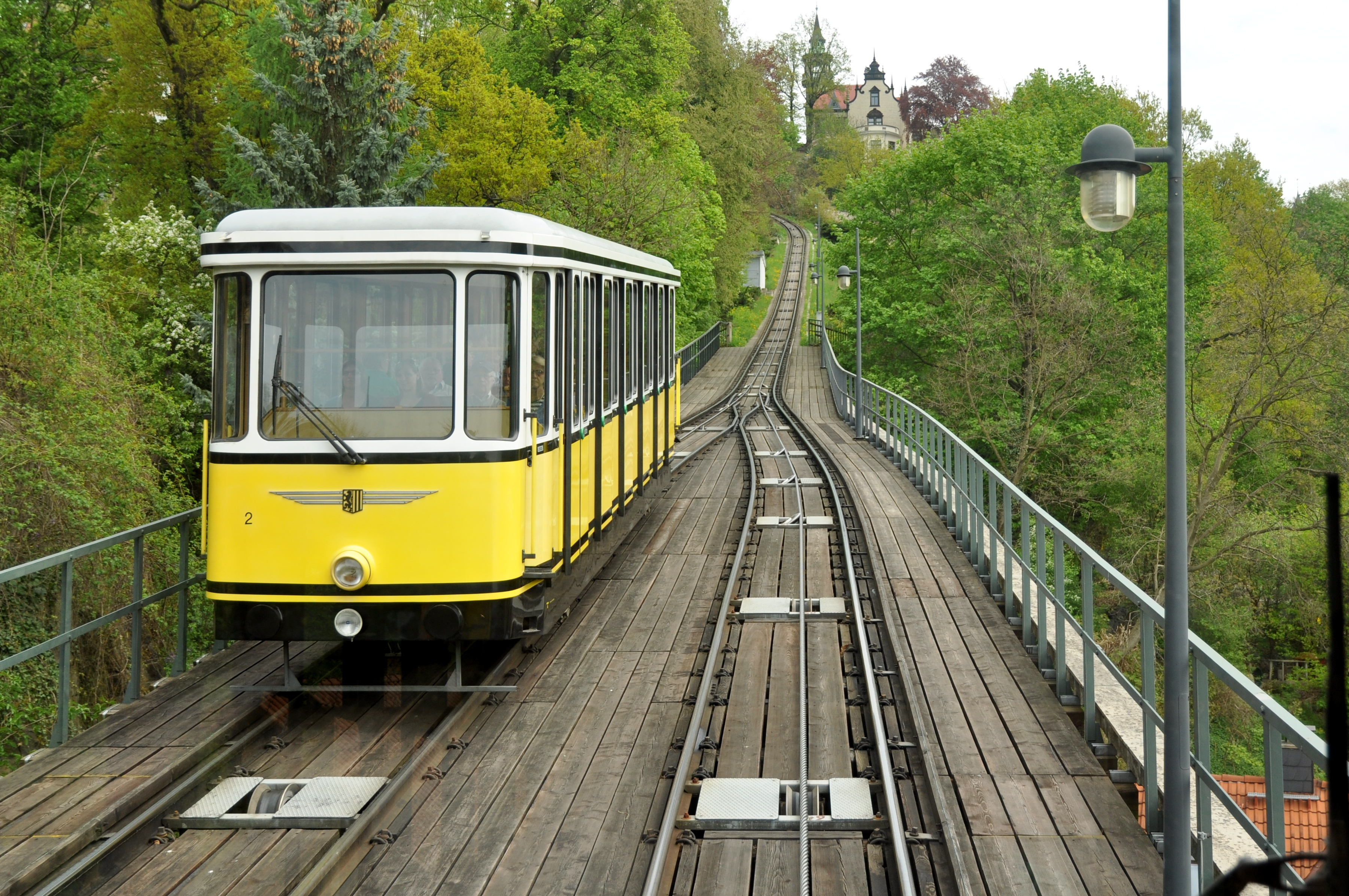 Ausweichstelle der Standseilbahn Dresden